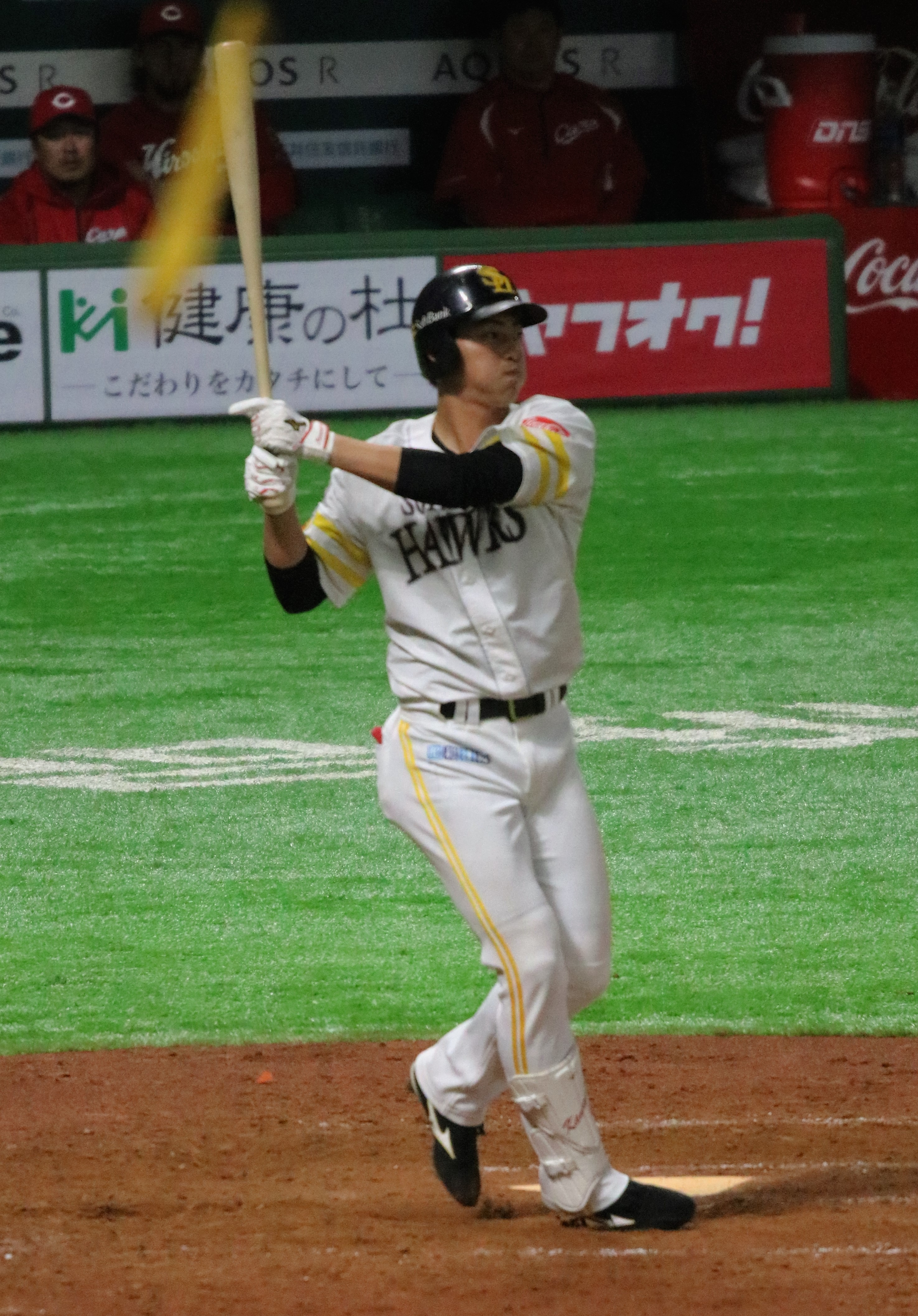 2018年3月24日 対広島東洋カープ